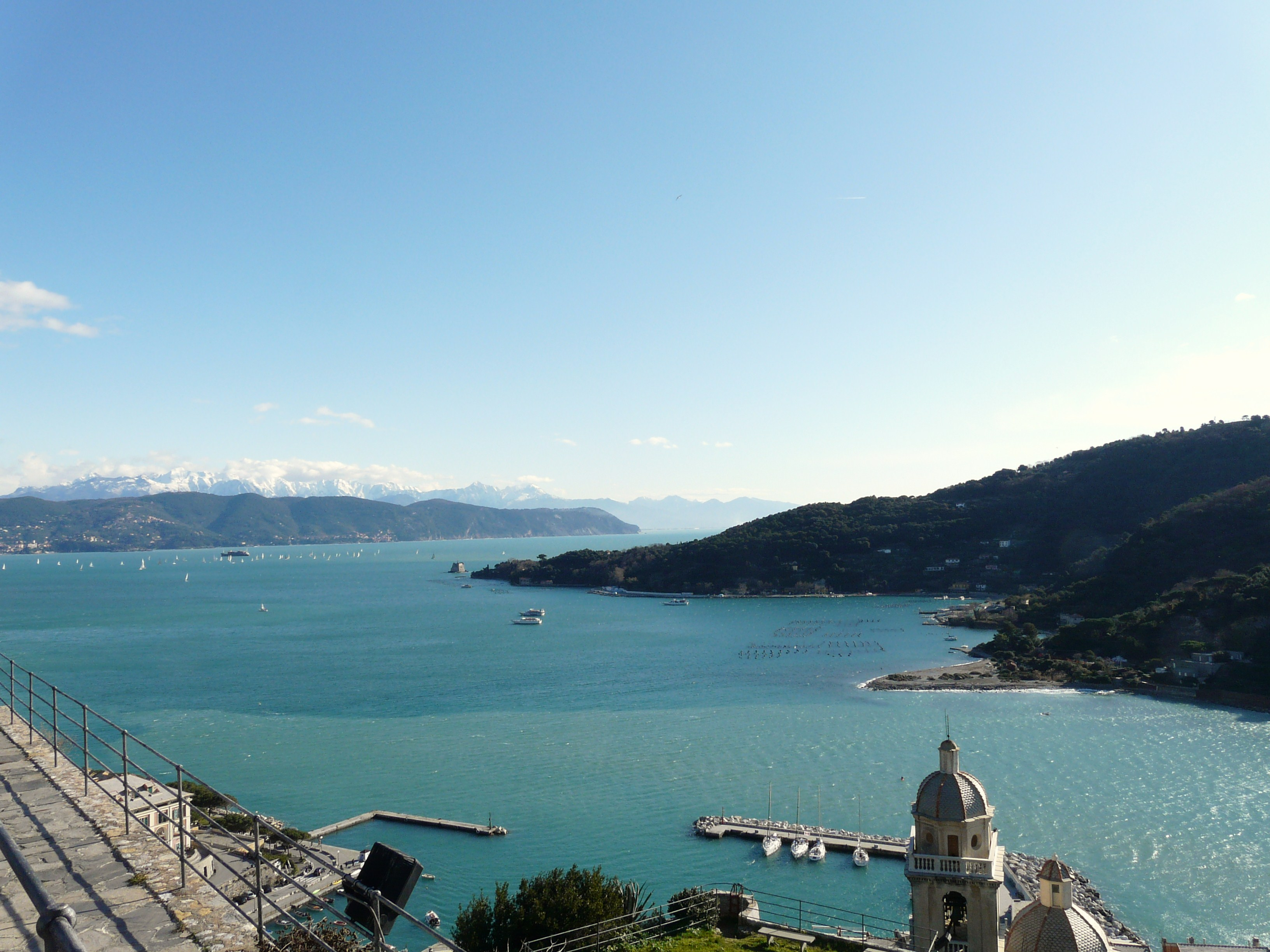 Isola Palmaria, Porto Venere, Liguria, Italia